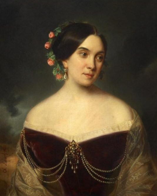 Воронцова-Дашкова Александра Кирилловна (ур. Нарышкина, в 2 браке де Пойни) (1817—1856)